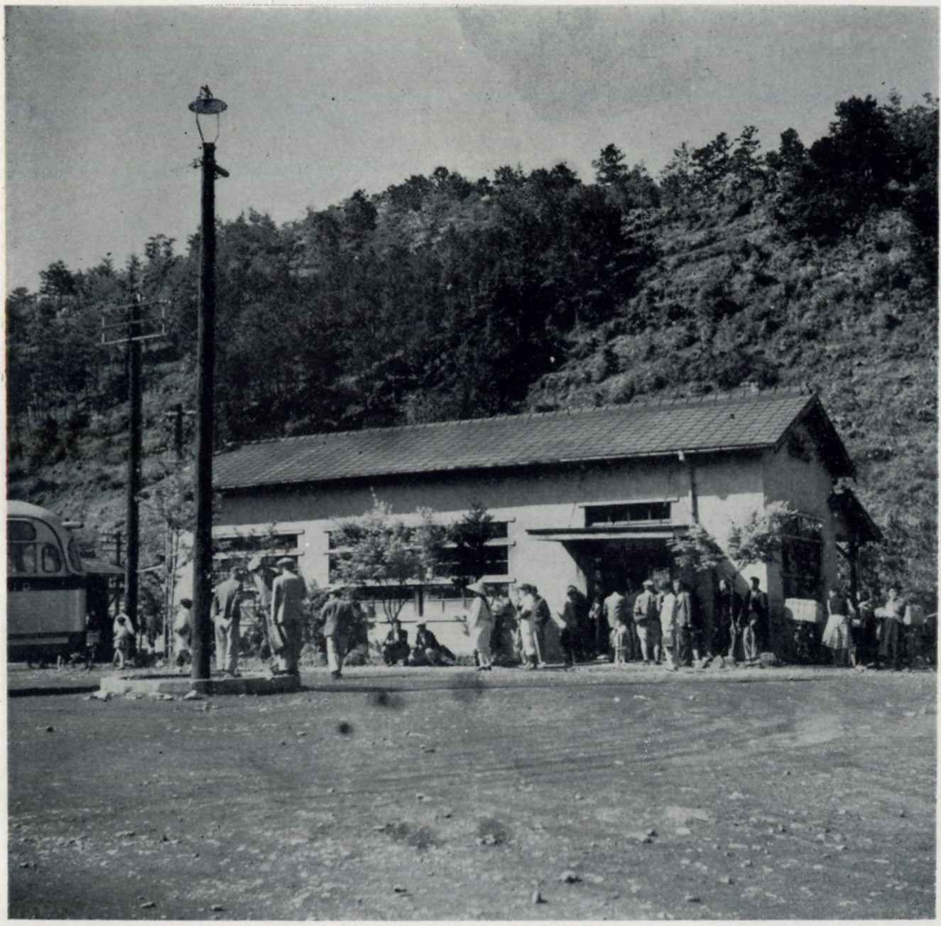 1954年(昭和29年頃)と思われる紀伊日置駅。出典書籍では本文でも一貫して「日置駅」と表記されている。同書冒頭の1955年1月31日付「はしがき」を読むと既に写真の手配が済んでいる様子なので、1954年頃と推定した。